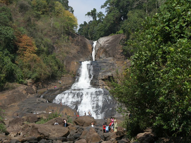 Bopath Ella Falls